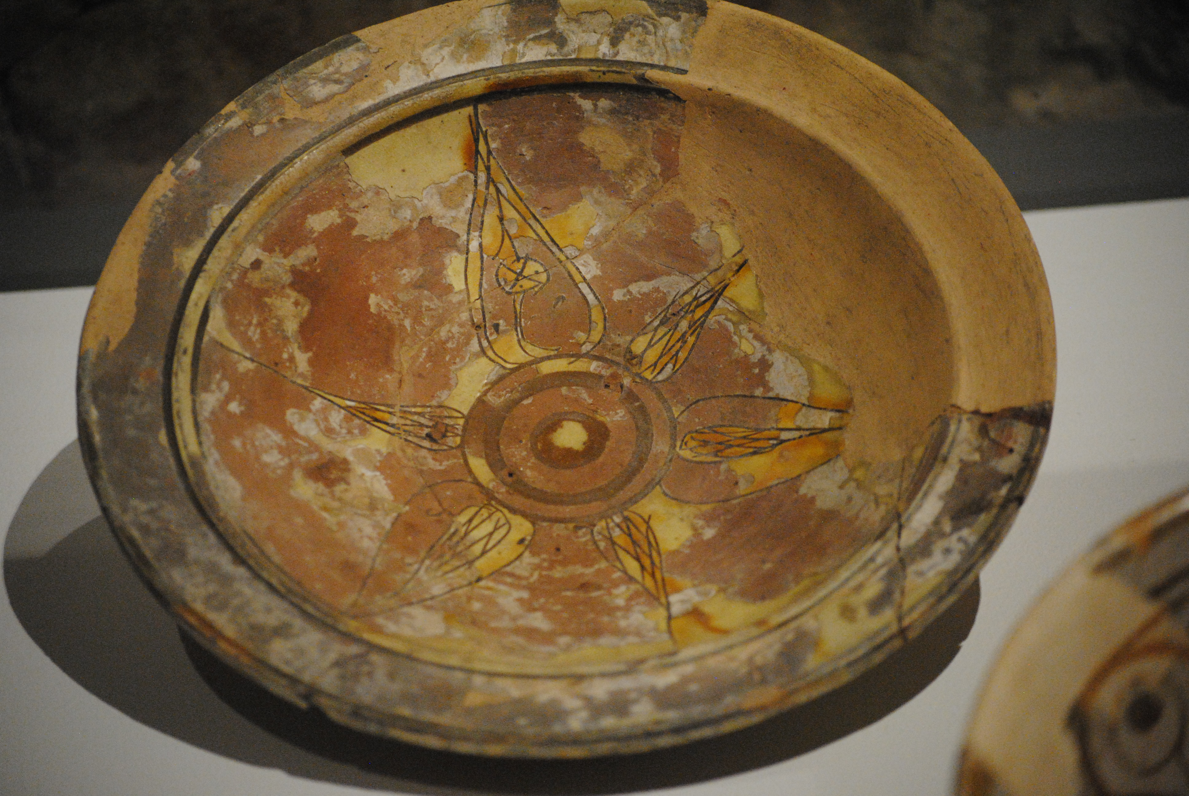 Scodella ingobbia e graffita (zeuxippus ware II) usata come bacino ceramico - importata dall'Attica (Grecia) nell'ultimo quarto del XII secolo (chiesa di San Michele degli Scalzi, Pisa) - Museo nazionale di San Matteo.